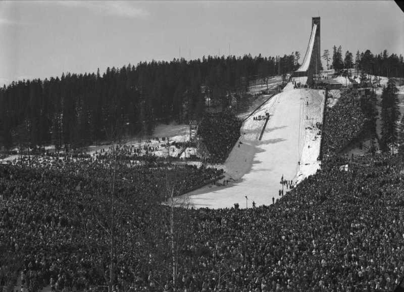 Holmenkollbakken